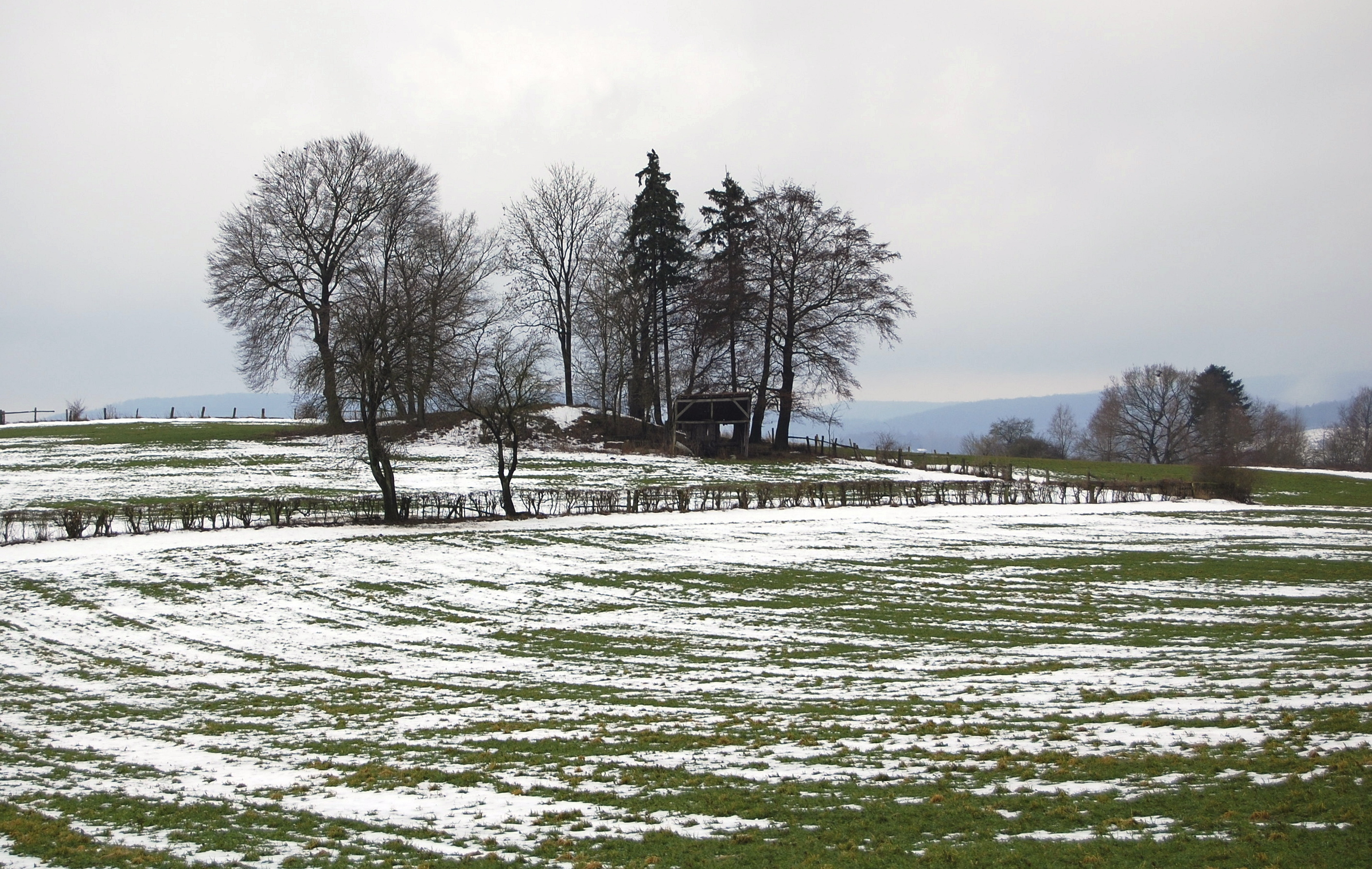 Kulturdenkmal Motte (mittelalterlicher Turmhügel) auf dem Kerlsberg nordöstlich von Alhausen (bei Ermissen), Bad Driburg, Deutschland.